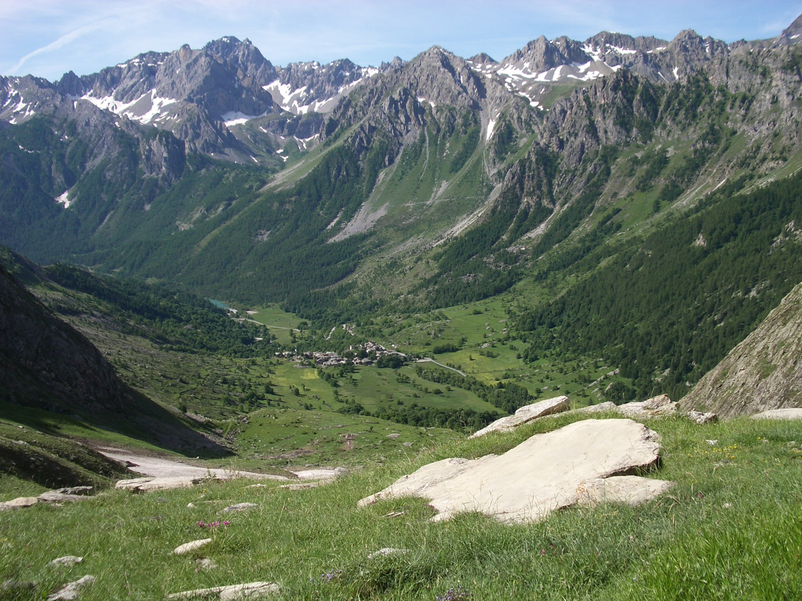 Acceglio, Maira Valley, Italy